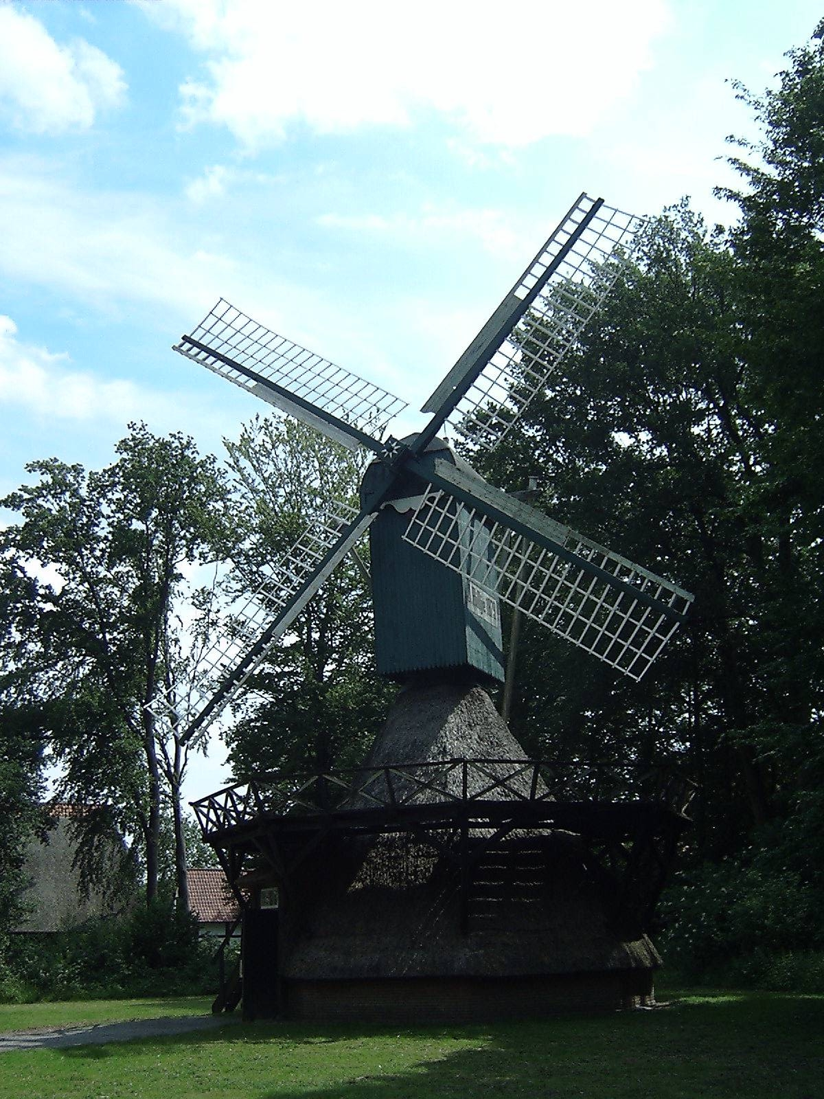 Windmill in Museumsdorf Cloppenburg